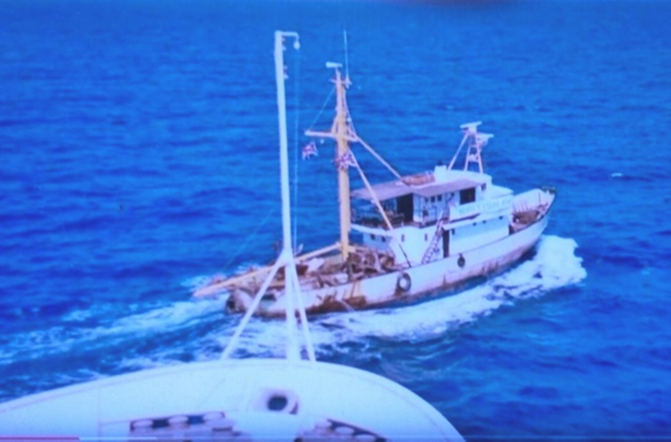 ספינת הדיג ניצן לפני חרטום אוניית המחקר בעת חפושי הצוללת דקר באלכסנדריה